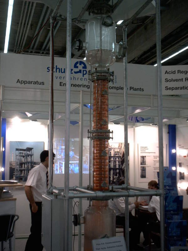 Екстрактор на Кюни